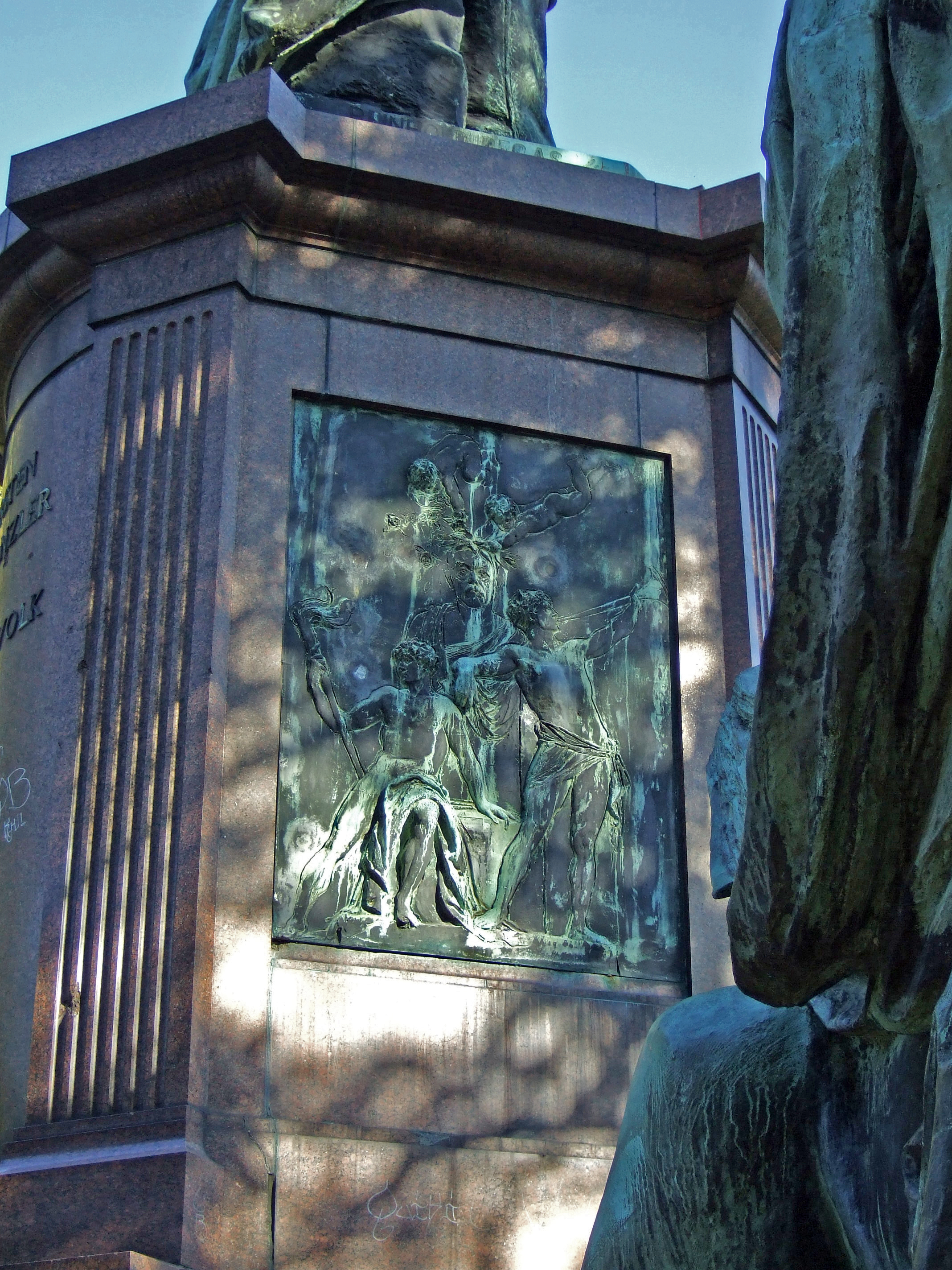 rechte Wange - Jüngling mit Fackel und Jüngling mit Fanfare vor der Herme Bismarcks